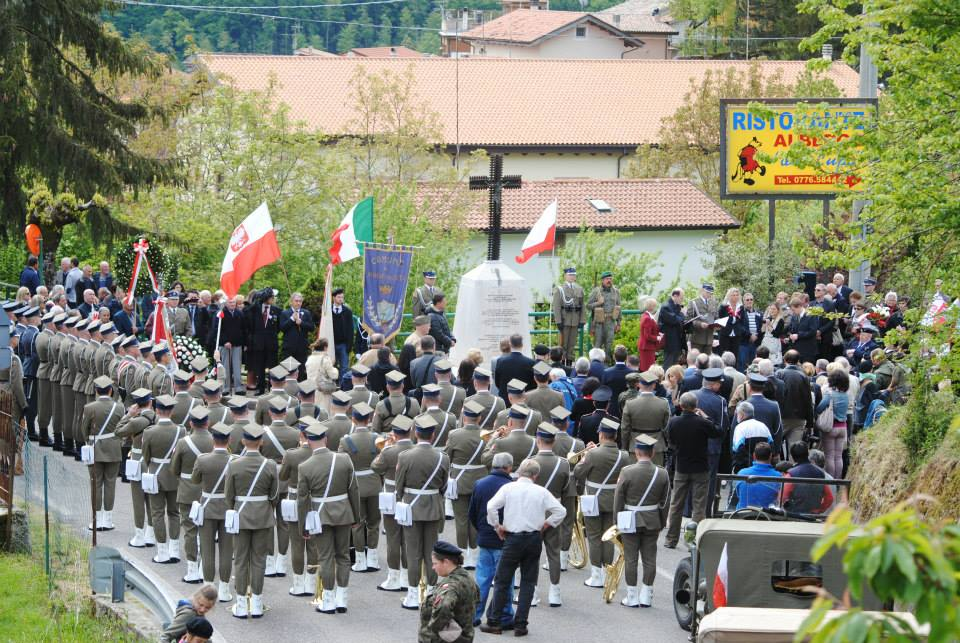 Monumento